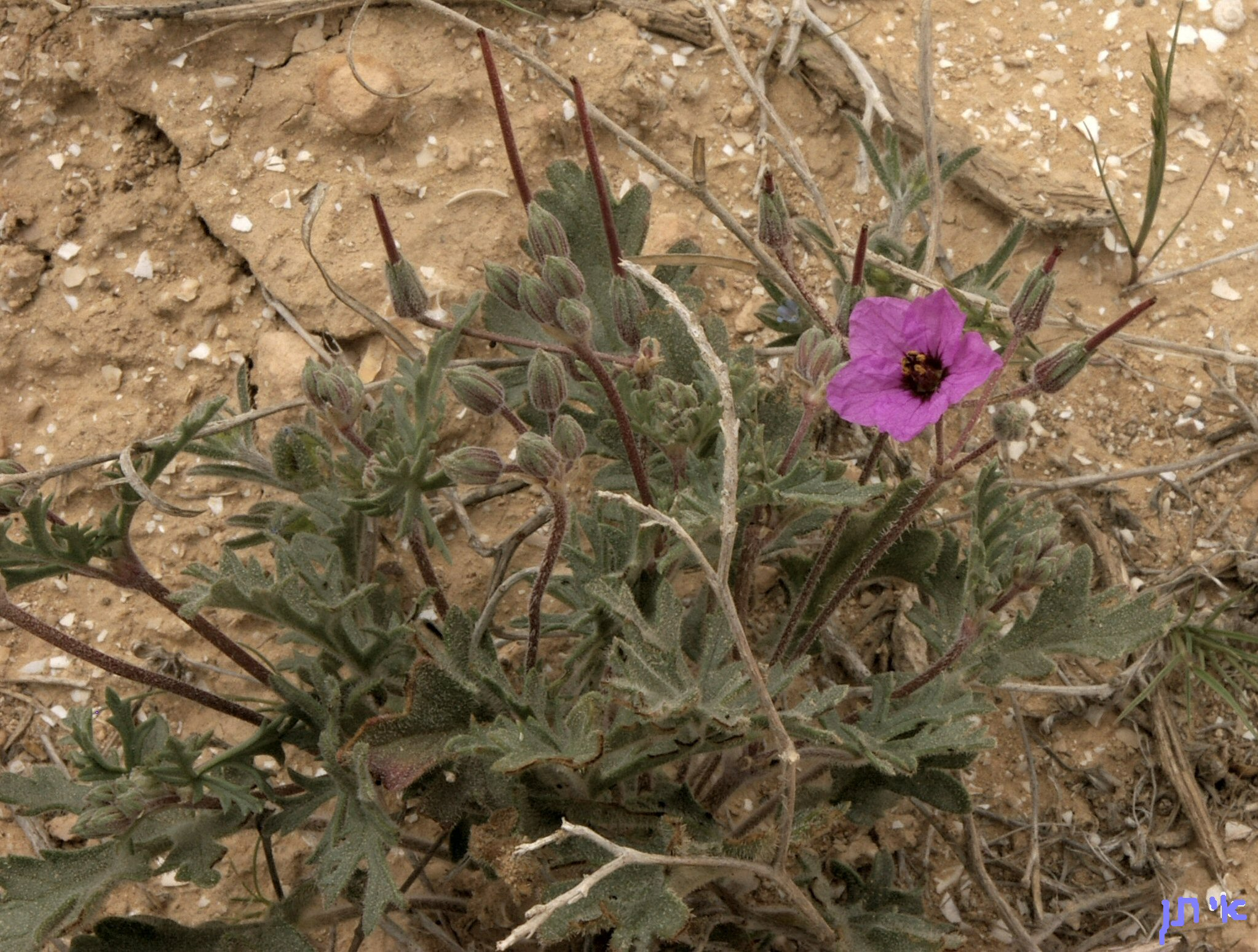 Erodium crassifolium, Desert Stork's-bill, Negev מקור חסידה שעיר, בורות לוץ